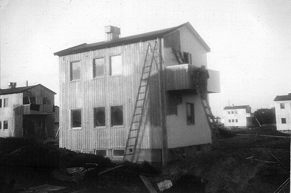 Bräcke, Lundby, Göteborg. Småstugeområdet under byggnad 1934